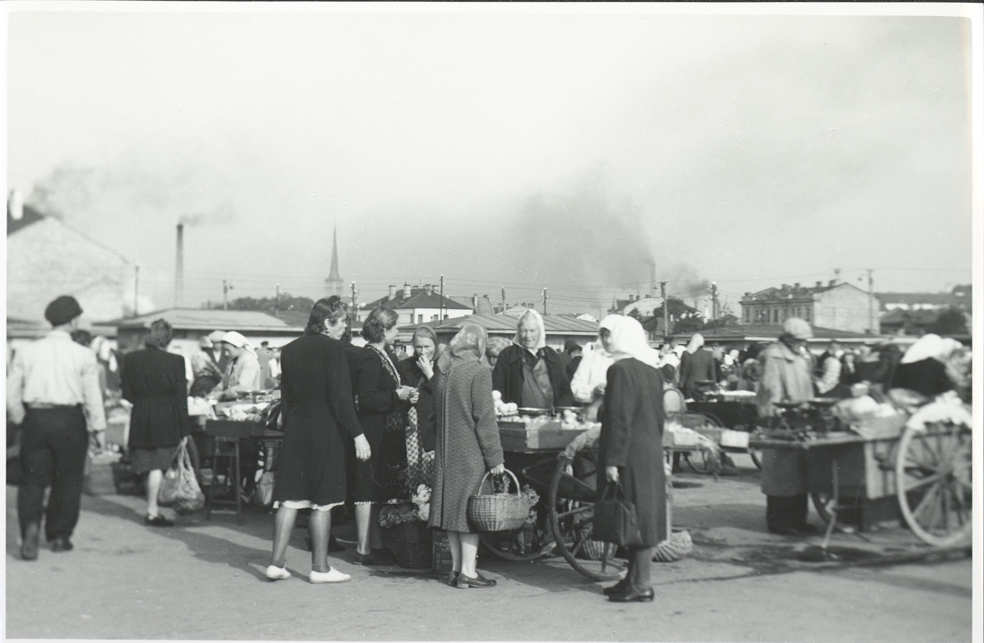 Keskturg